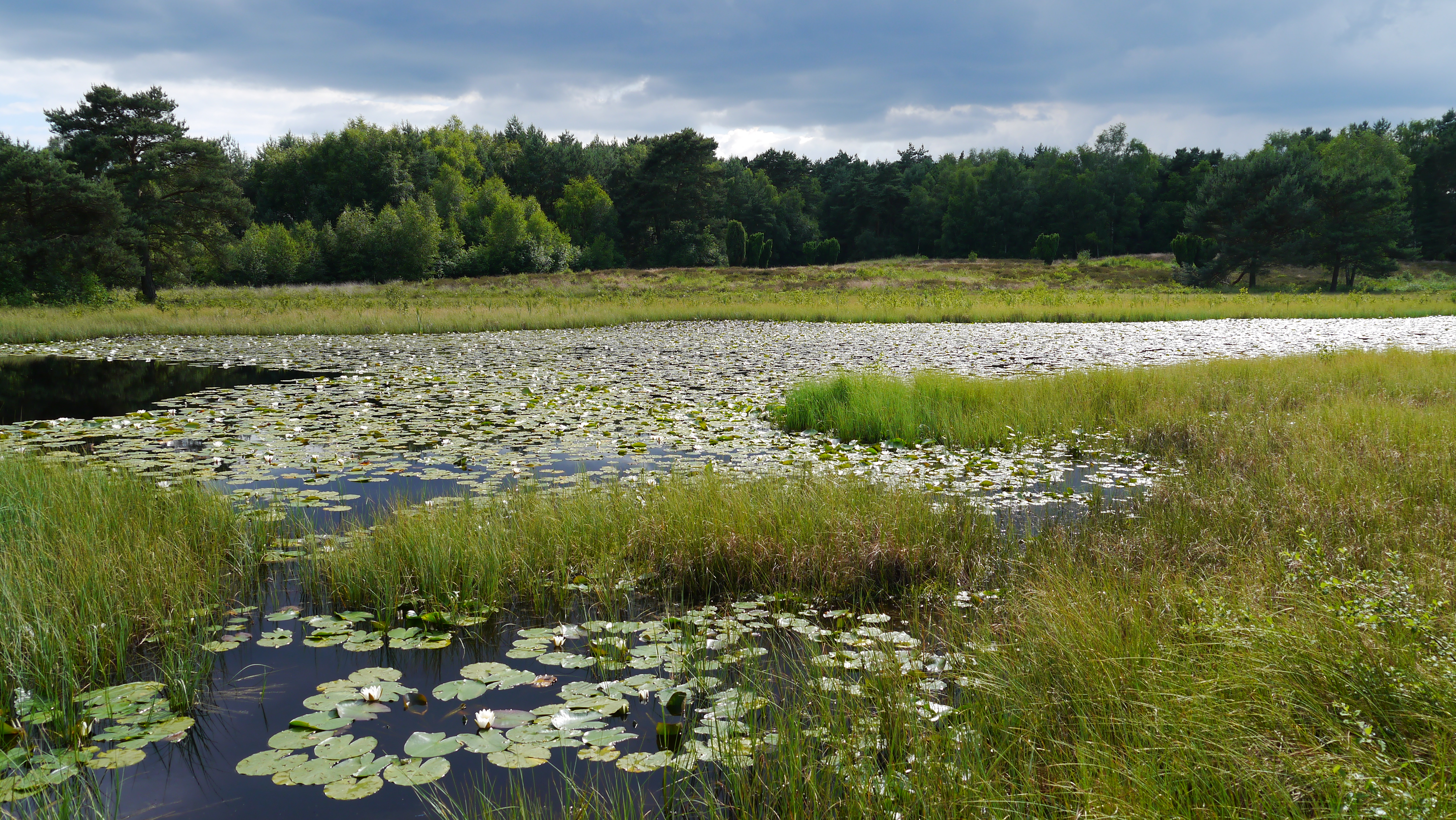 Das Blanke Flat in der Nachmittagssonne; NSG Blankes Flat in Neustadt am Rübenberge